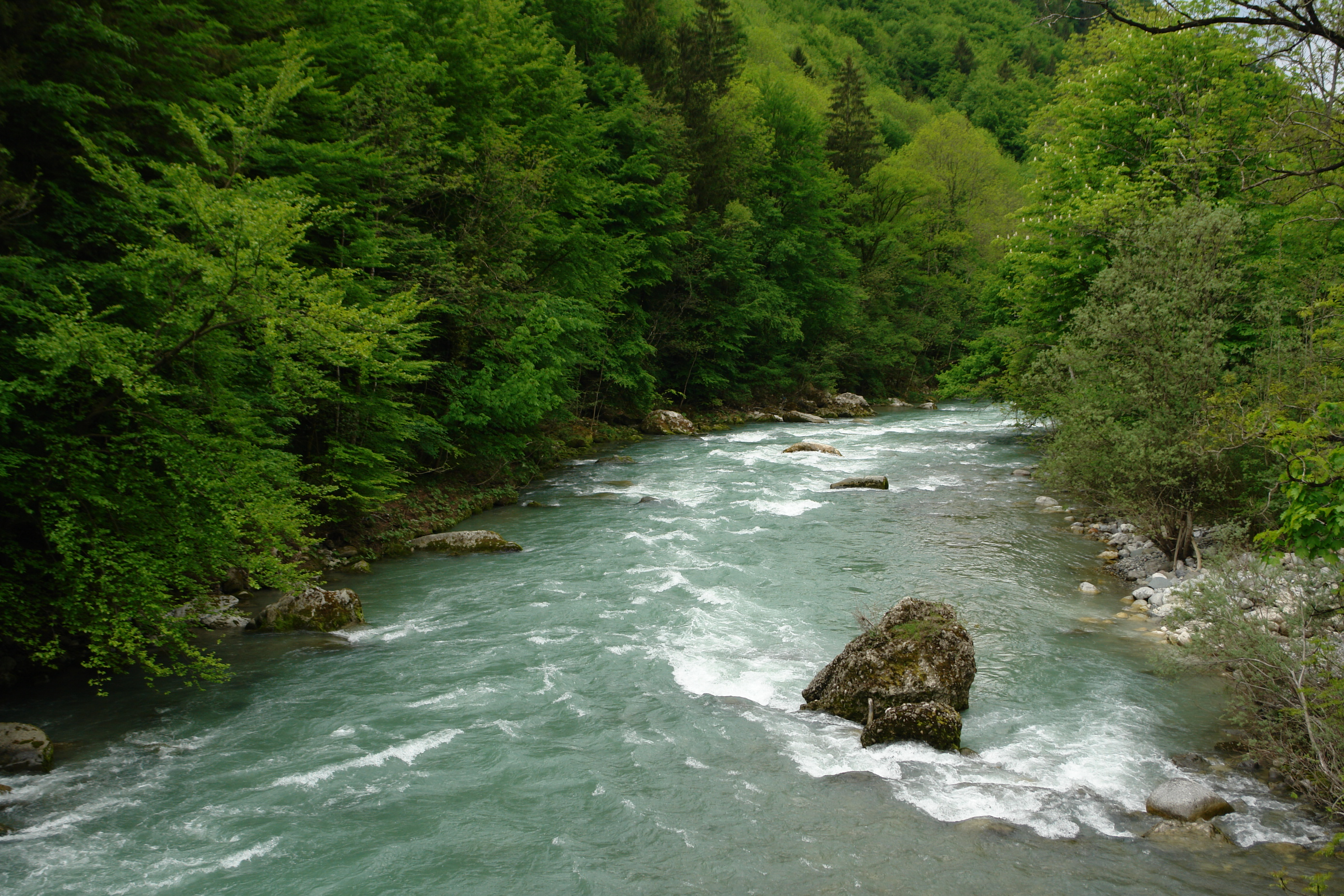 Dranse (Haute-Savoie)